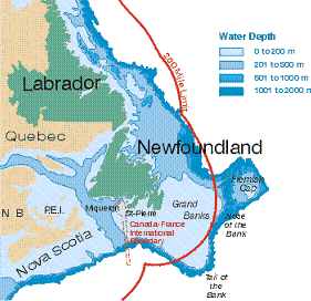 Imagen con el Flemish Cap a la derecha